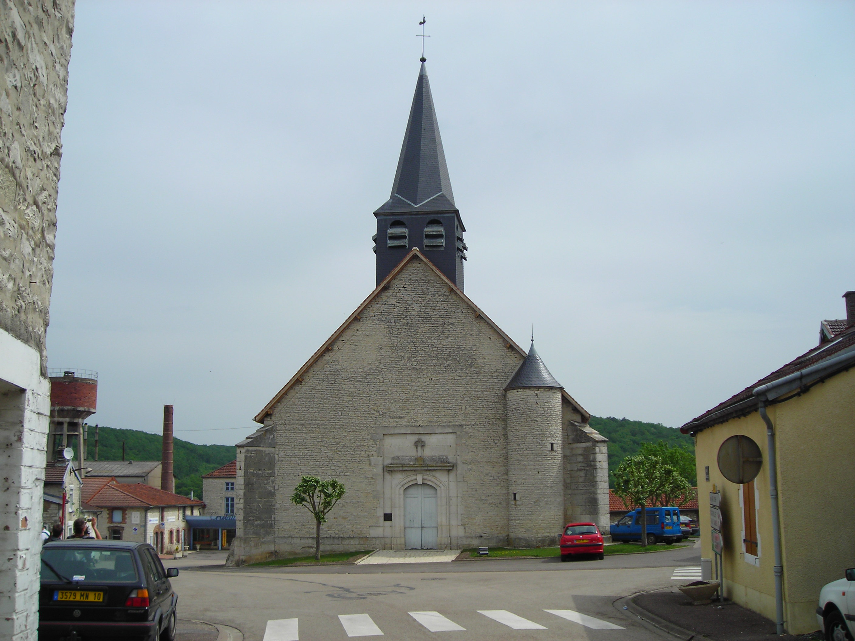 église Saint-Martin de Bayel, XIIème et XVIIIème siècles